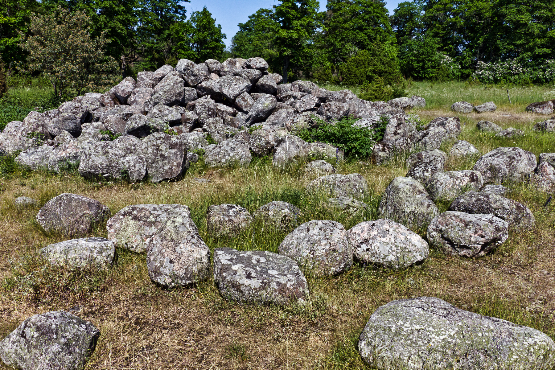 Pühalepa Püha leppe kivid